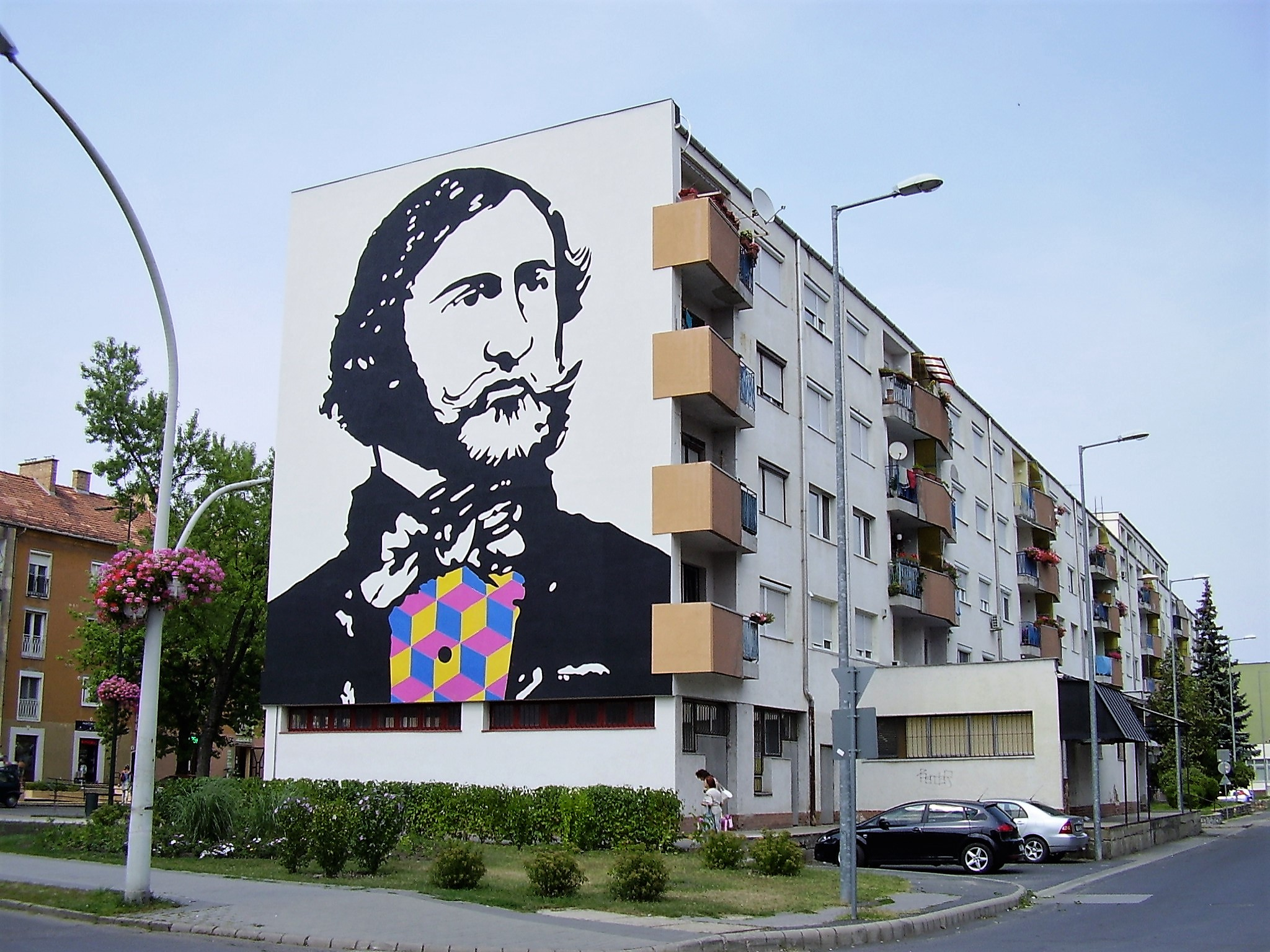 Egressy-portré fehér háttérrel az eredeti 2013-as elpusztult (kozterkep.hu alapján) Színes falak program Kazincbarcikán keretében készült. - Borsod-Abaúj-Zemplén megye, Kazincbarcika, Egressy Béni út 40